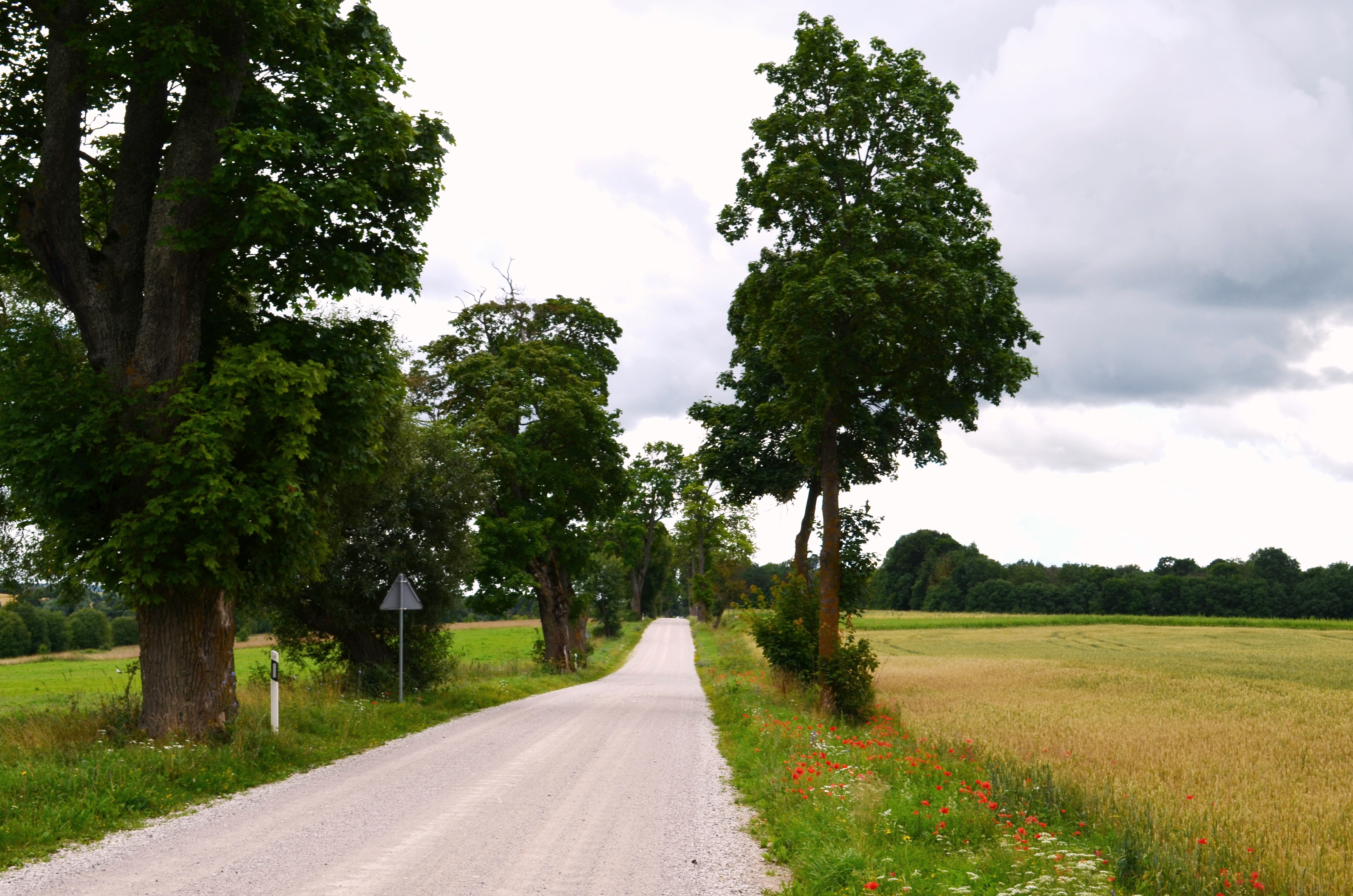 Kelias Naujamiestis-Krekenava už Vadaktų, Panevėžio raj.